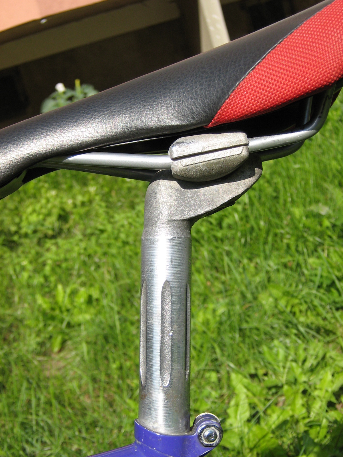 Sztyca